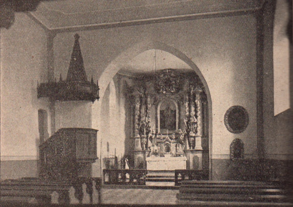 Kostel svatého Jakuba Většího v Otrubech (část Lidice Menší či Lidický dvůr). Interiér kostela